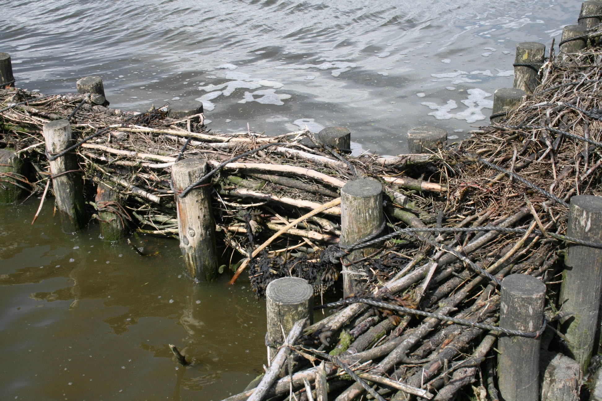 Lahnungen